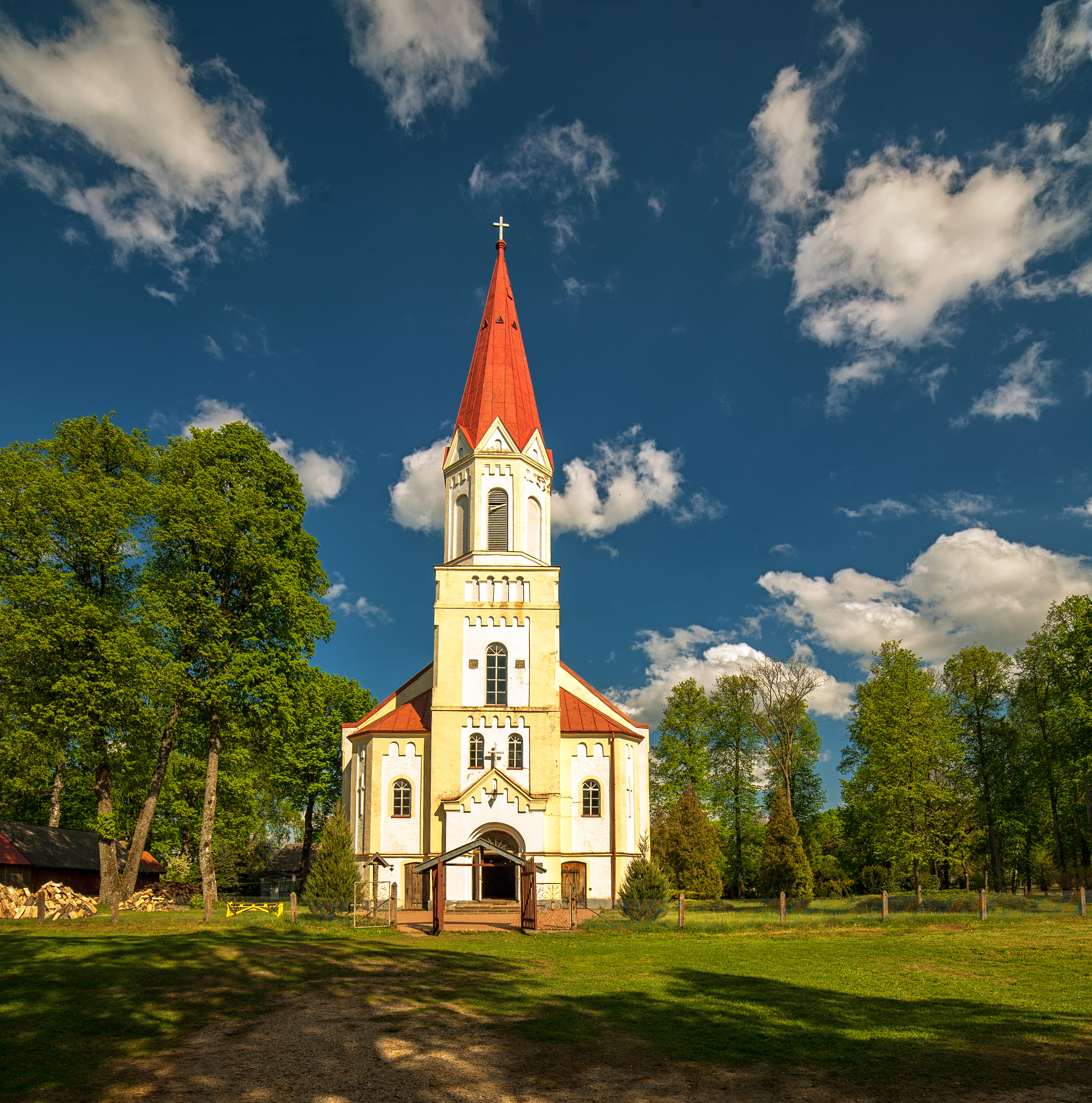 Rucavas luterāņu baznīca, Rucavas pagasts